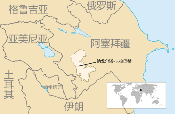 纳戈尔诺-卡拉巴赫位置图